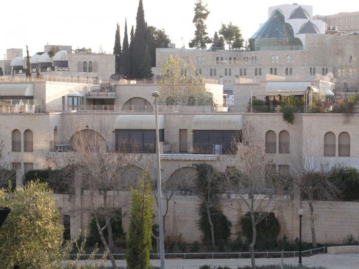 Jérusalem - quartier de Mamilla - zone résidentielle de luxe du "Village de David".